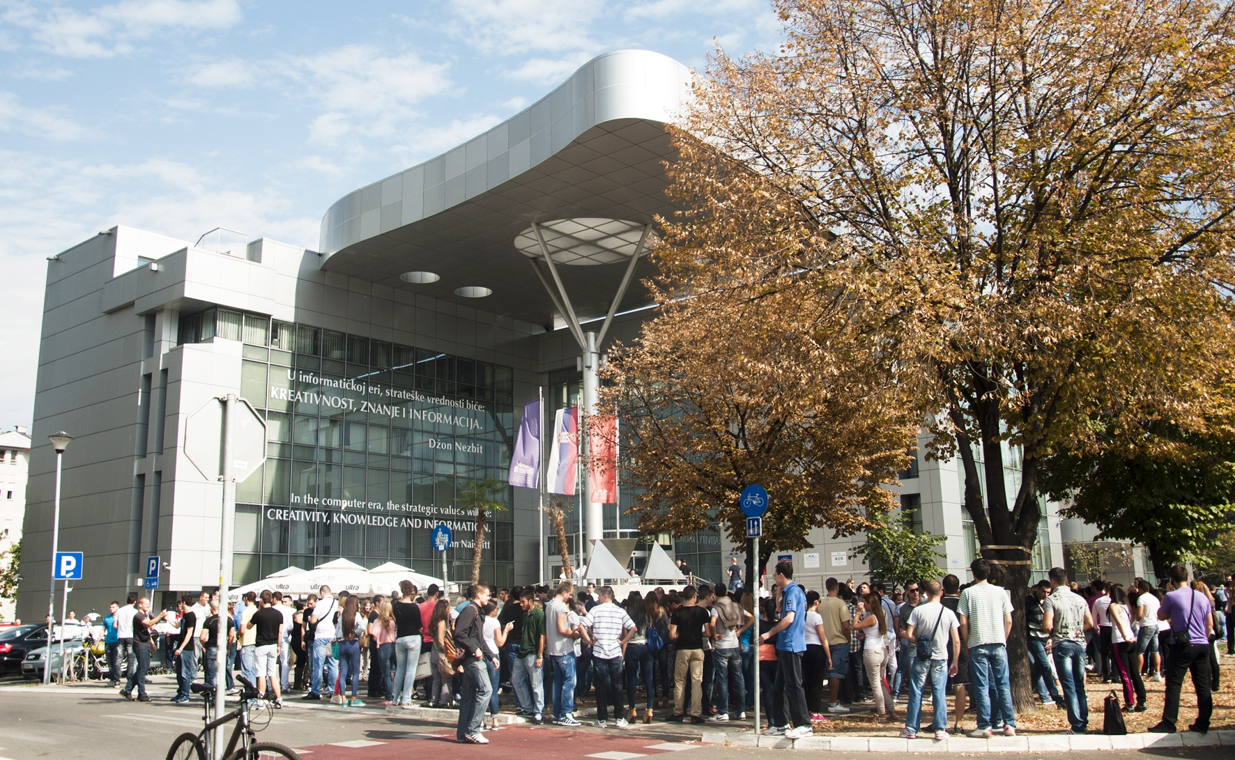 Зграда универзитета Мегатренд на Новом Београду. Сликао Голдфингер